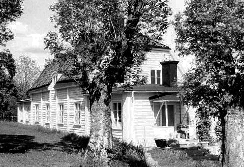 Skogs-Ekeby gårds huvudbyggnad